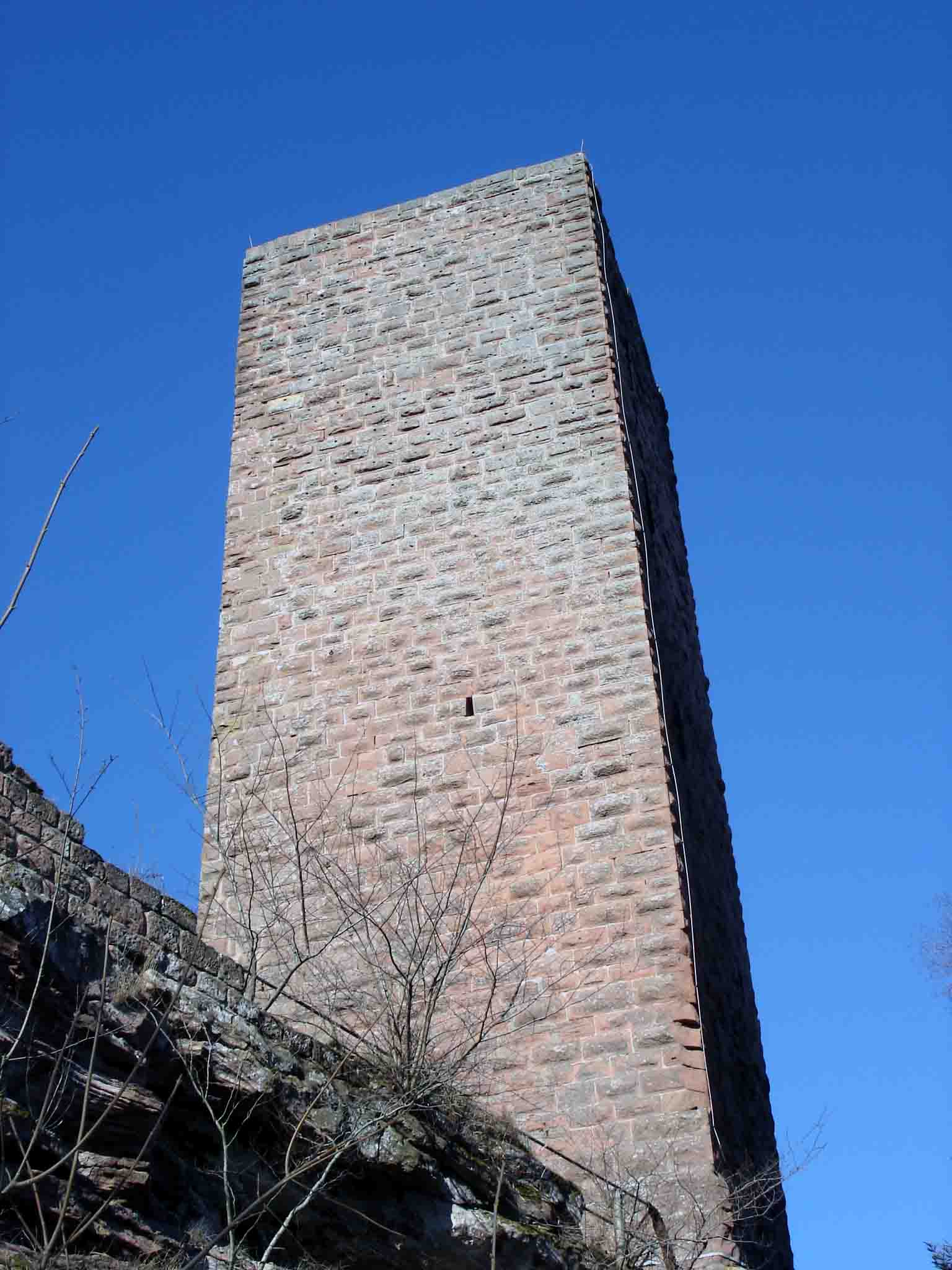 Bergfried der Burg Scharfenberg